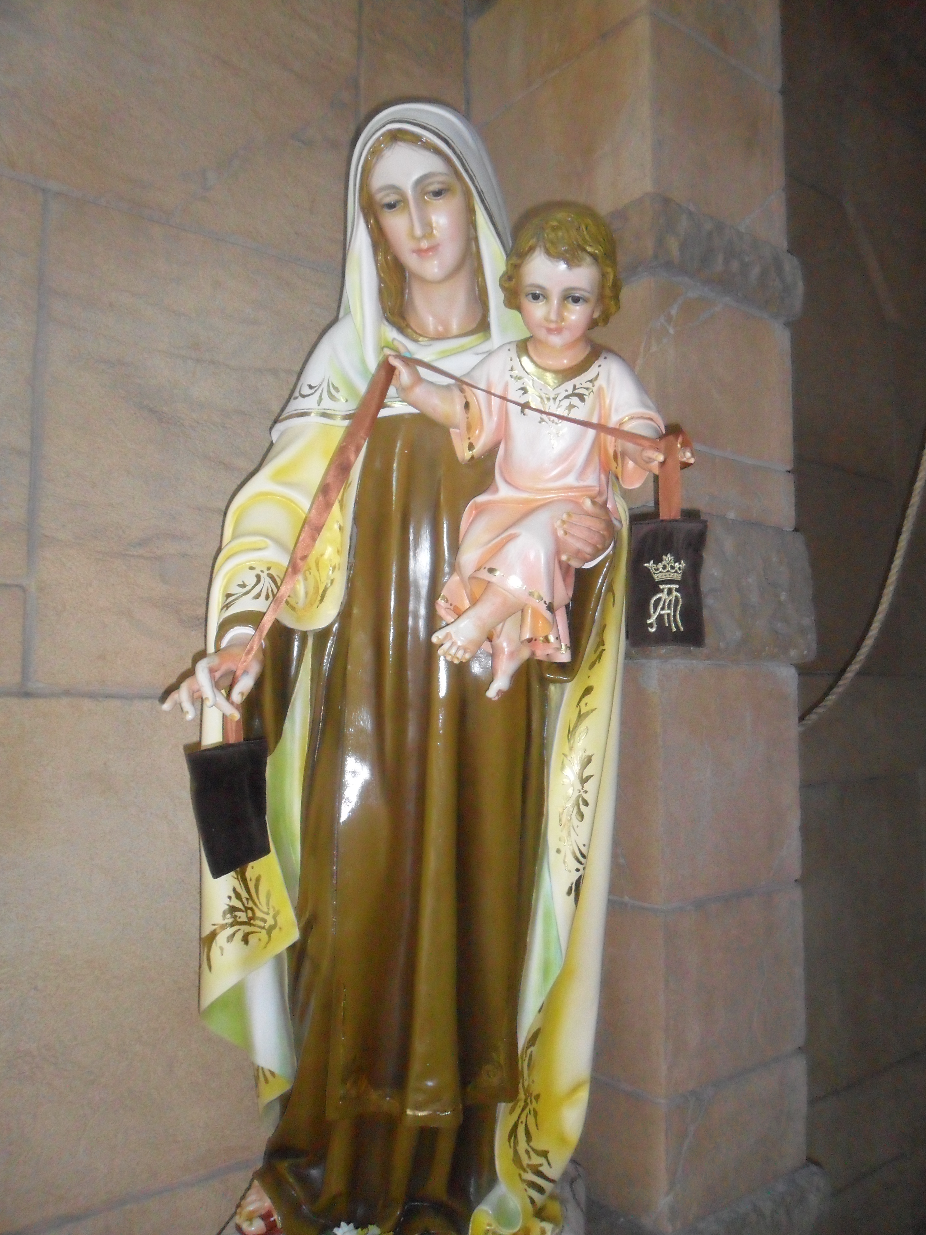 中文（香港）: 聖母聖衣堂, 香港, 中國